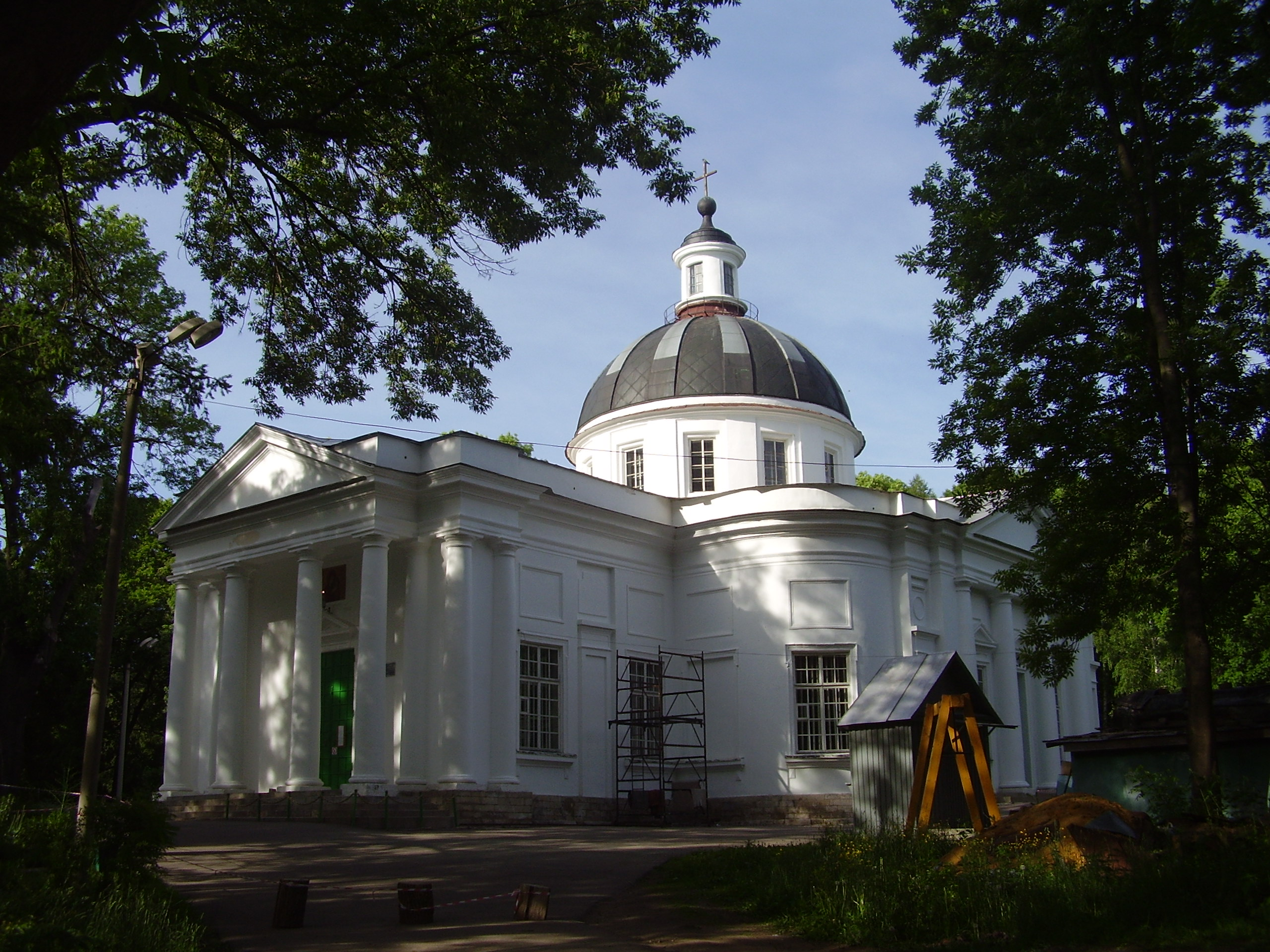 Тульская область.г.Богородицк.Свято-Казанский храм. (Храм Казанской иконы Божией Матери)